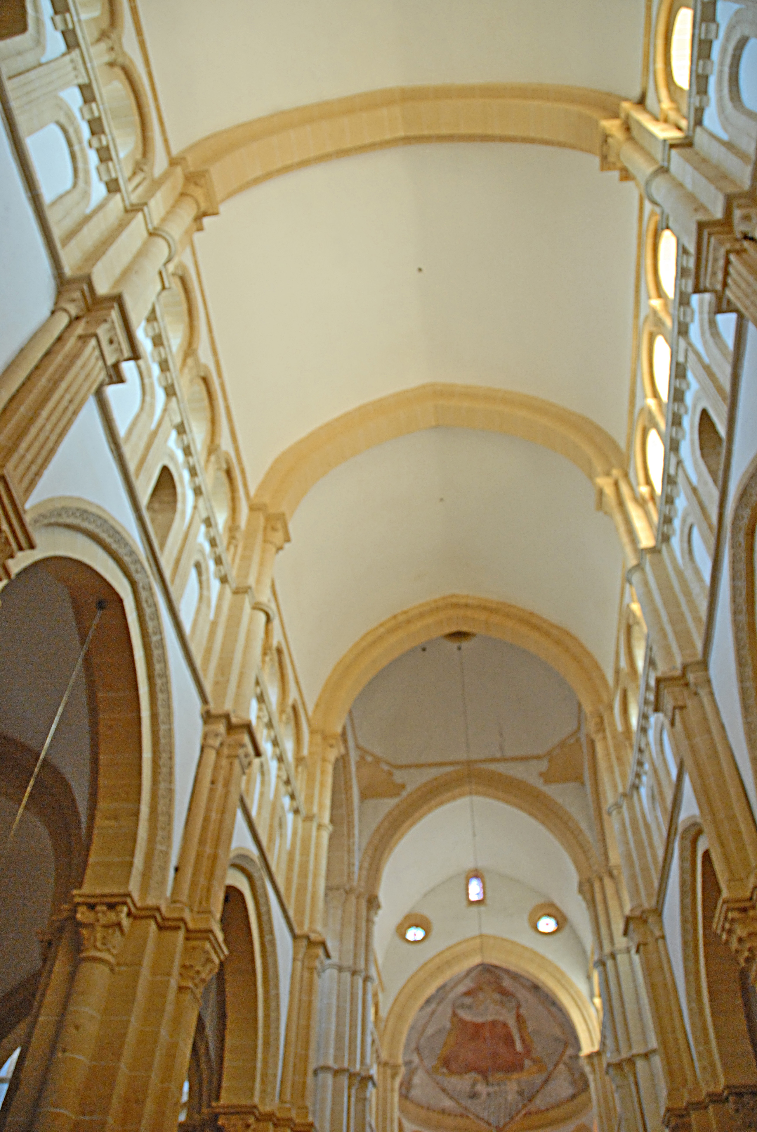 Mittelschiffgewölbe